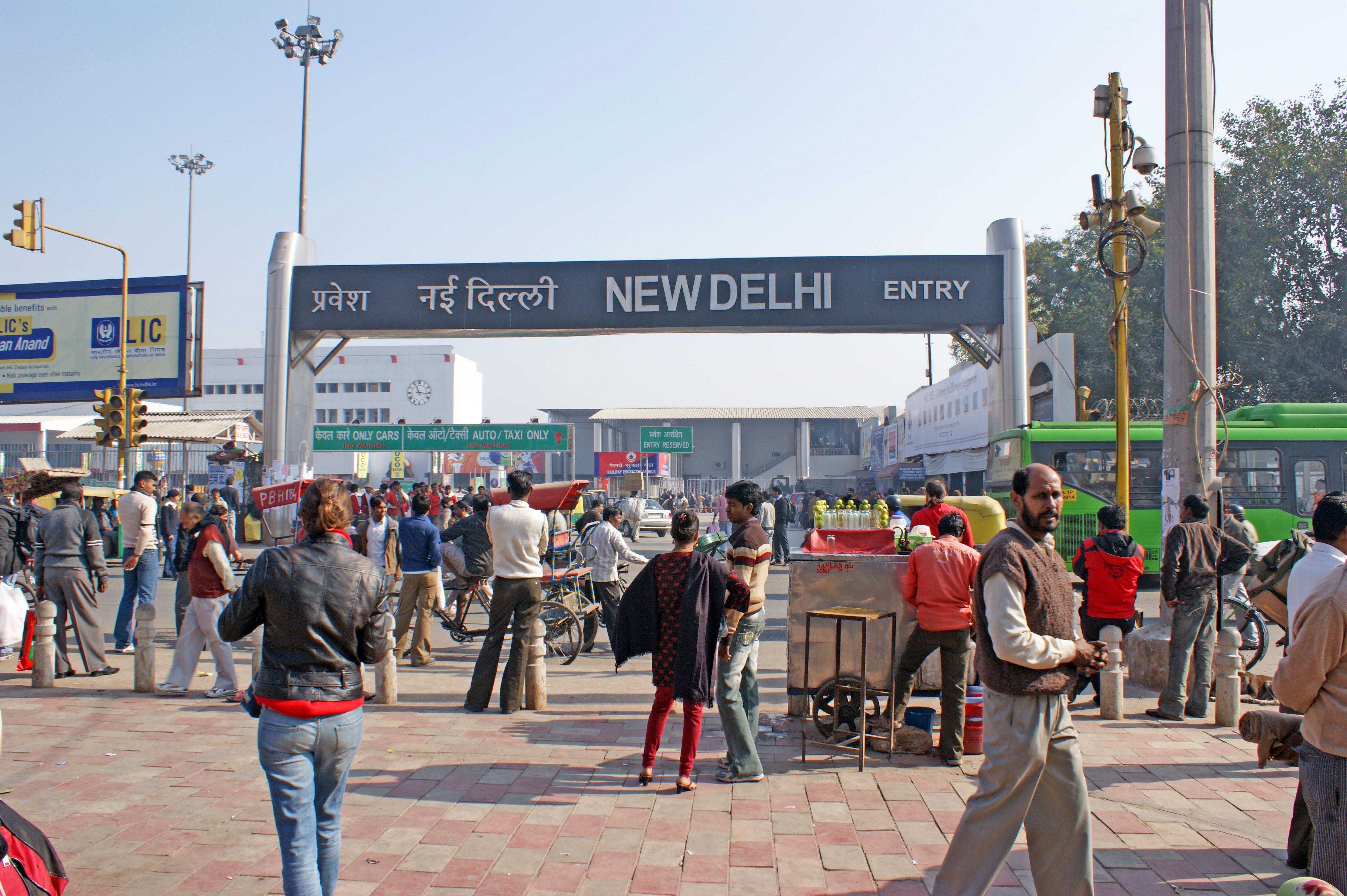 Entrée de la gare de New Delhi